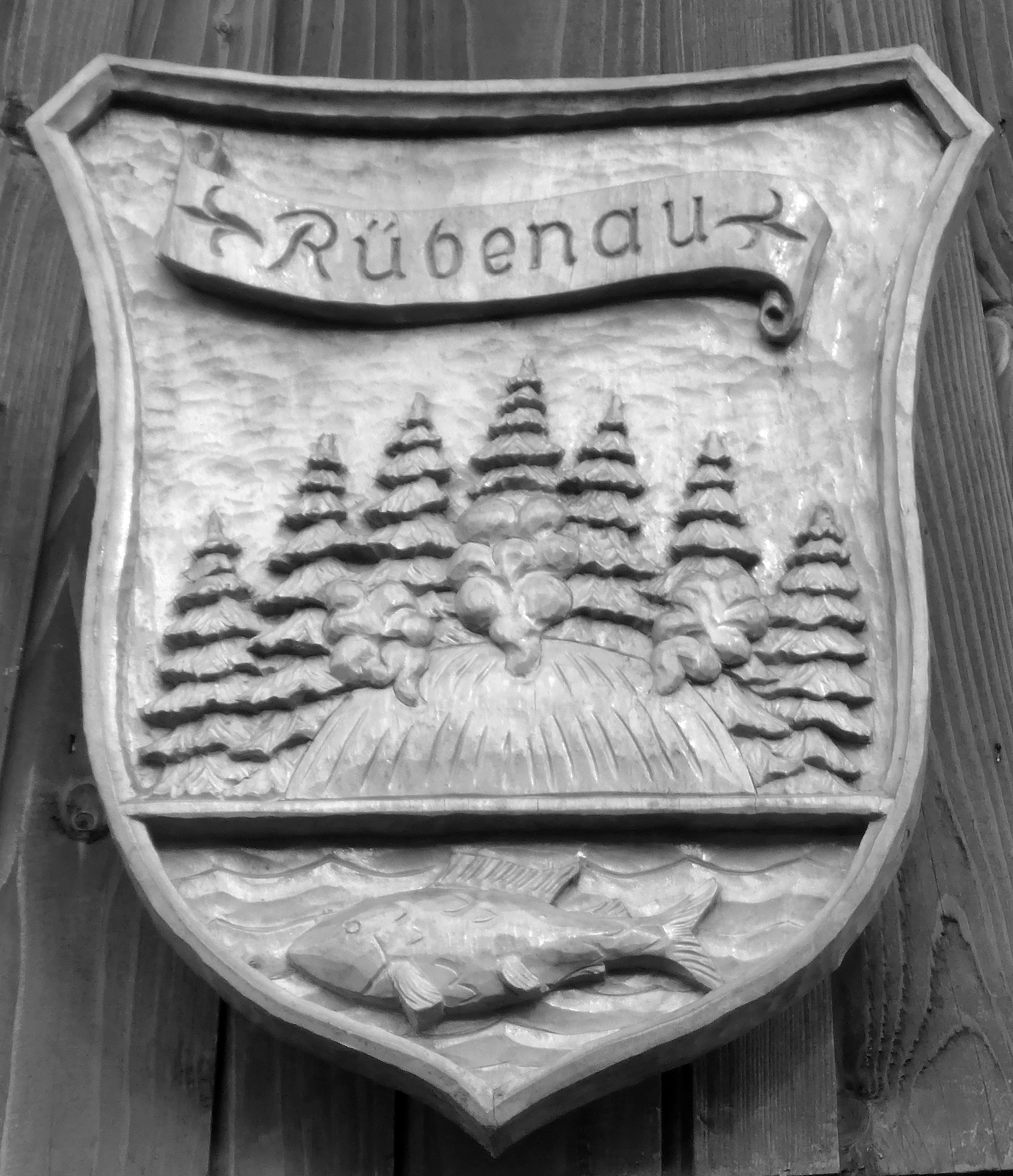 Ortswappen Rübenau (Marienberg) (Holz), Erzgebirgskreis - Sachsen.